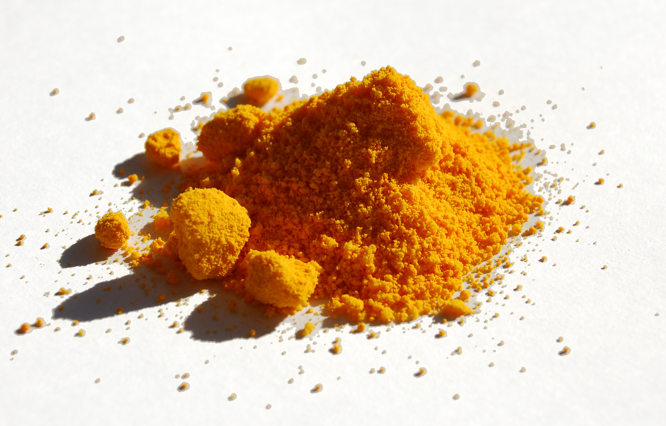 Ammonium cerium(IV) sulfate sample